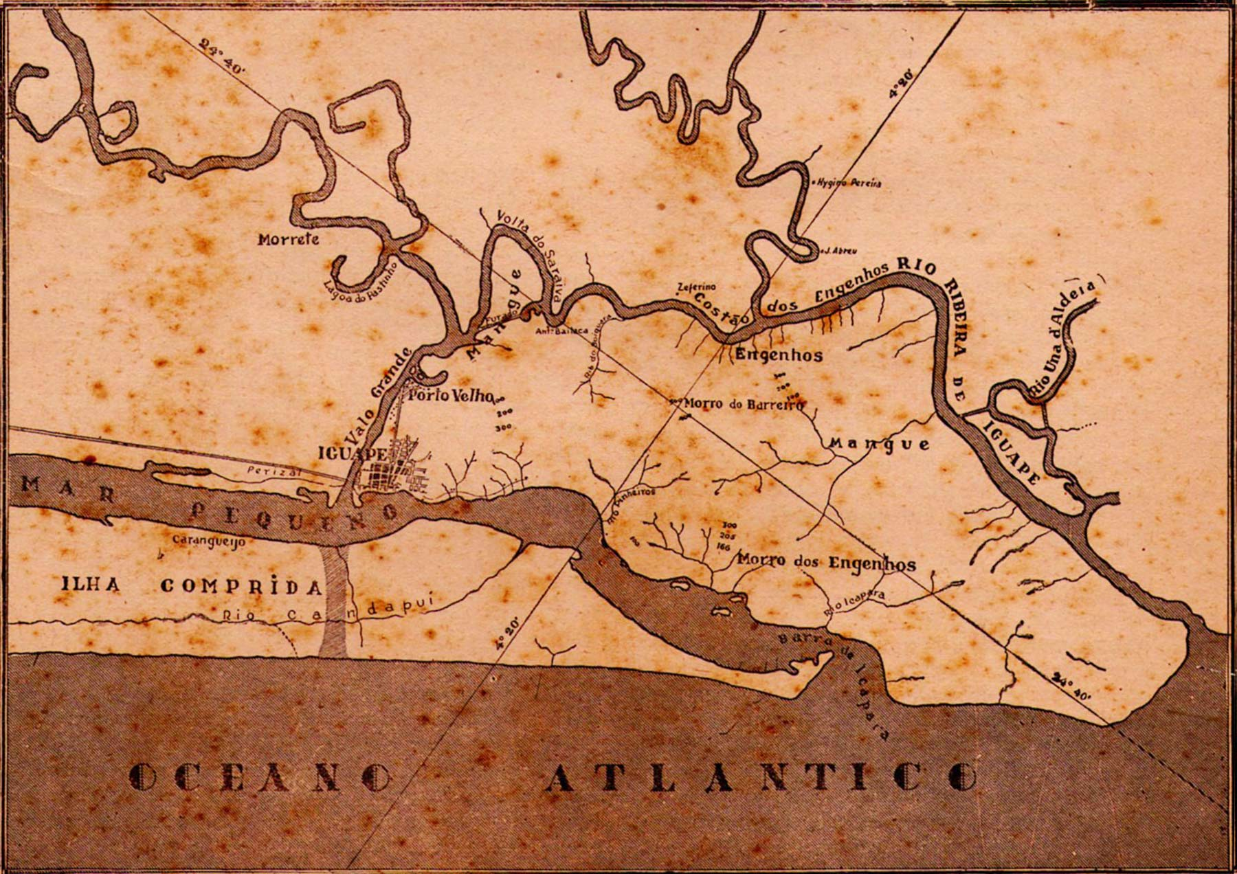 Mapa de 1930 sobre o Canal do Valo Grande, artigo de Sud Mennucci. No desenho publicado nos anos 1930 e que ilustrou o artigo de Sud Mennucci, todos os detalhes do Mar Pequeno, do Rio Ribeira de Iguape, do Oceano Atlântico e do Valo Grande. A "continuação" do canal era o que estava sendo proposto na época — é a área hachurada ao lado de onde está escrito "Ilha Comprida".